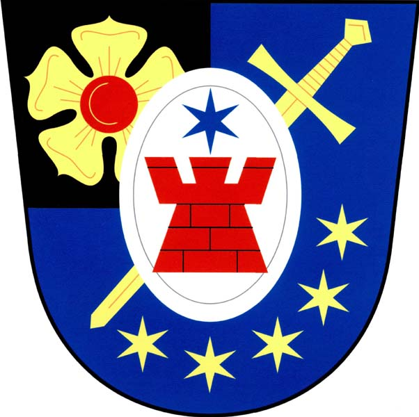 Znak obce Bezděkov (okres Klatovy)